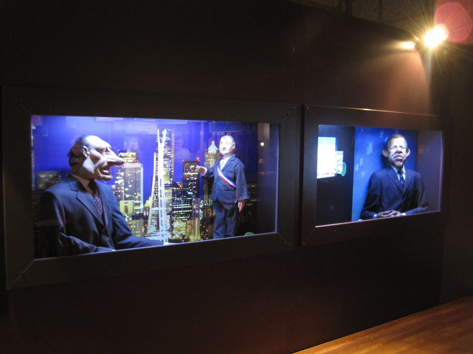 Jacques Chirac et PPDA - Patrick Poivre d'Arvor - Guignols de l'info - Canal+ - Exposition de marionnettes de la citadelle de Besançon